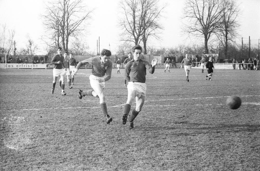 auf dem Kilia-Fußballplatz am Hasseldieksdammer Weg.